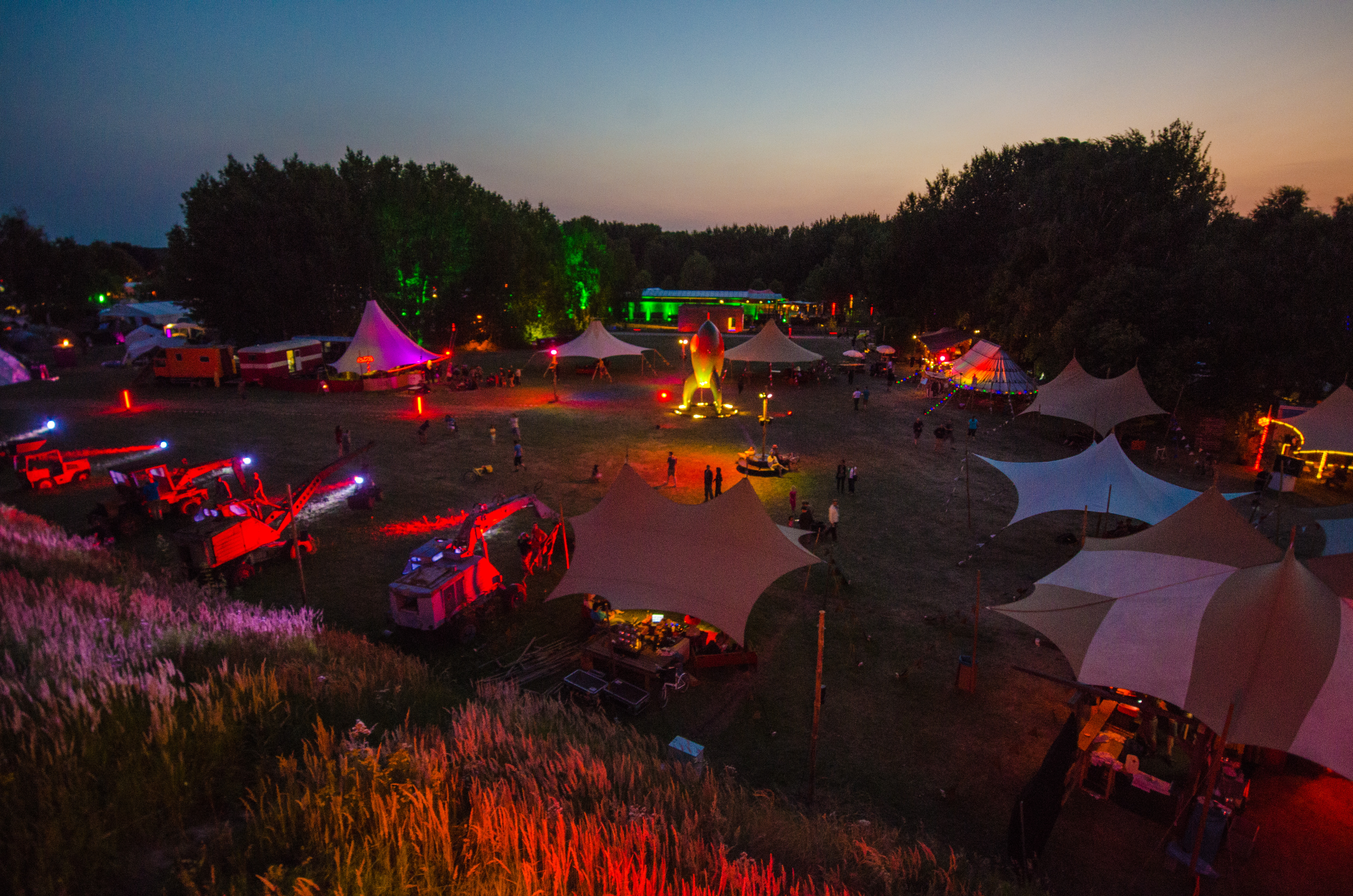 Die Fairydust auf dem CCCamp15 in Mildenberg